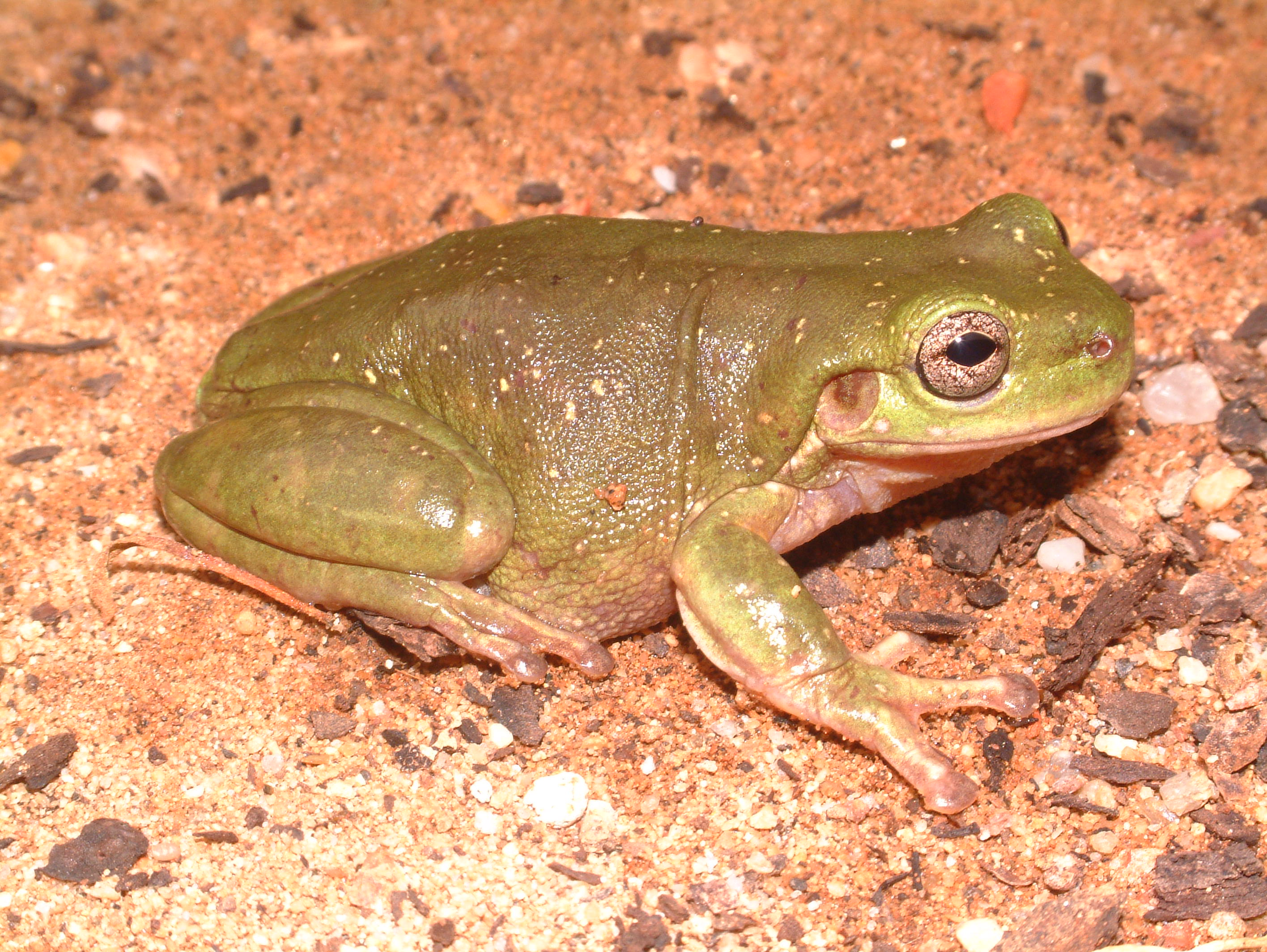 Centralian Tree Frog (Litoria gilleni)